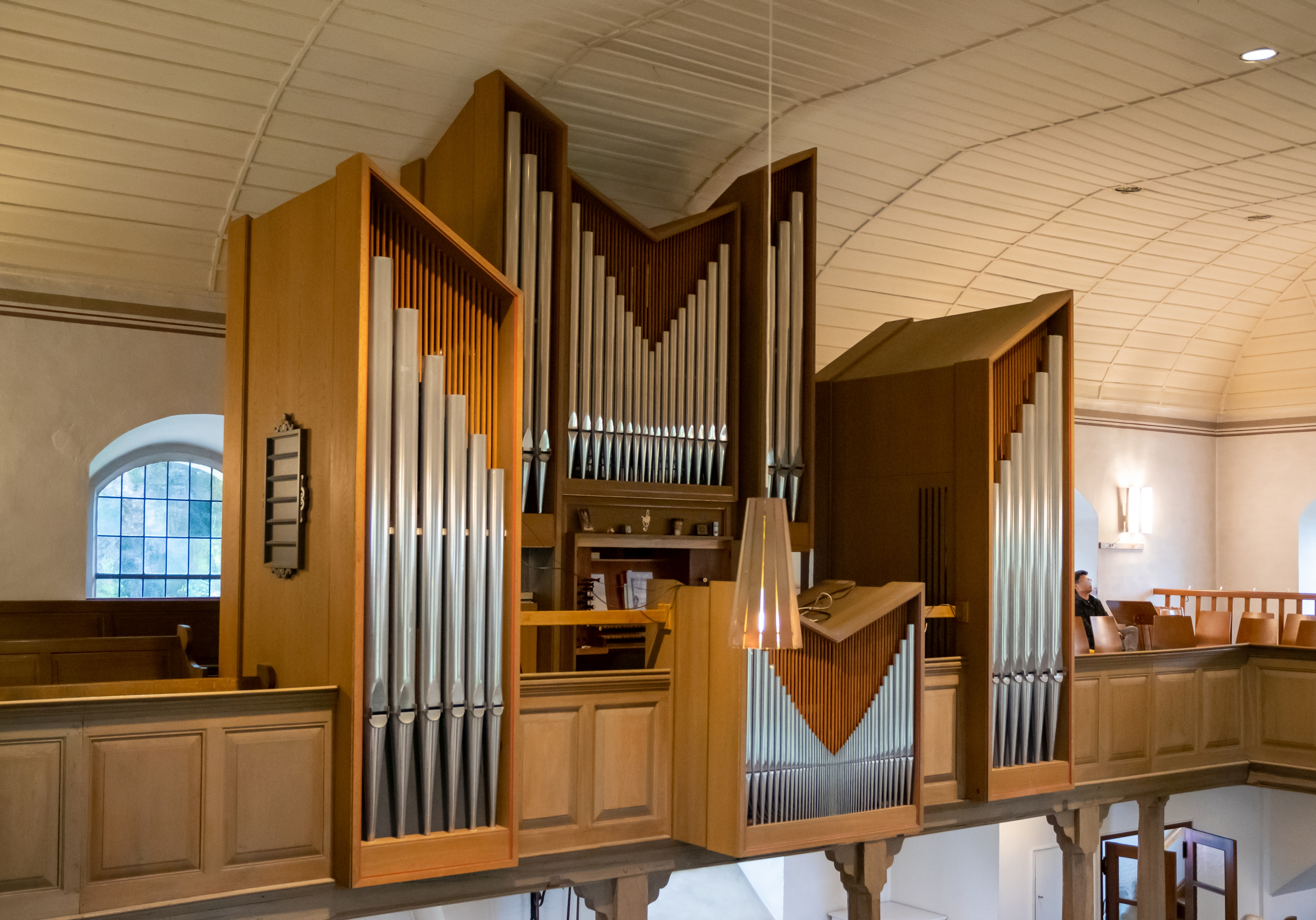 Evangelisch-reformierte Kirche in Stapellage, Lage (Lippe); Steinmann-Orgel von 1969